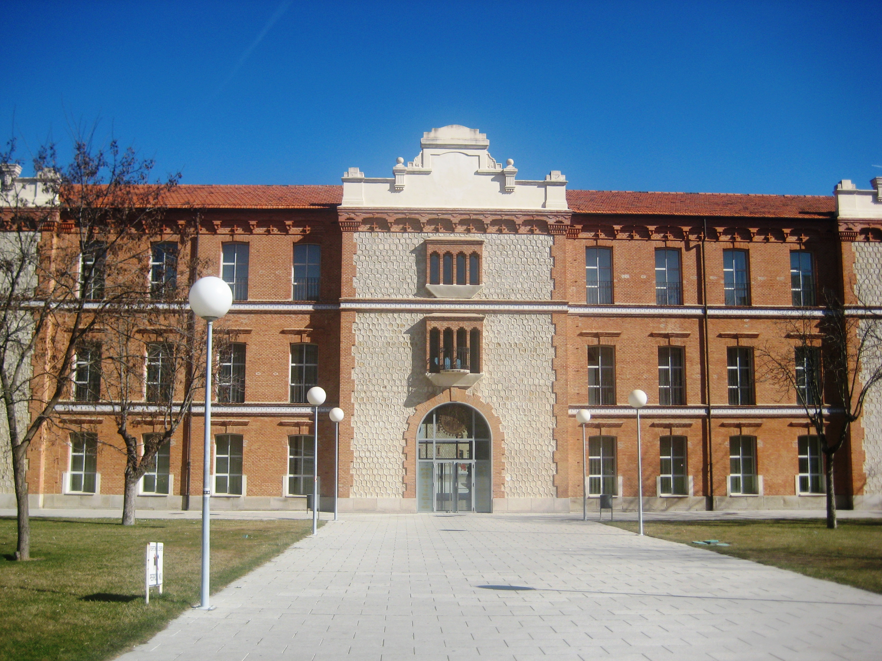 Campus Viriato (Zamora).